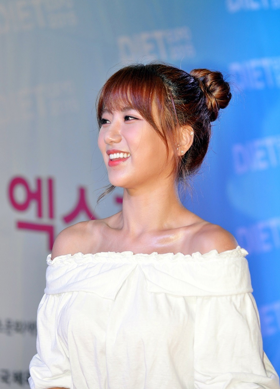 2015년 세계다이어트엑스포 팬사인회 현장에서 예정화